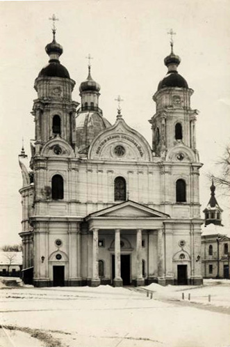 Церква Різдва Пресвятої Богородиці у Холмі. Поч. ХХ ст. Поштівка.